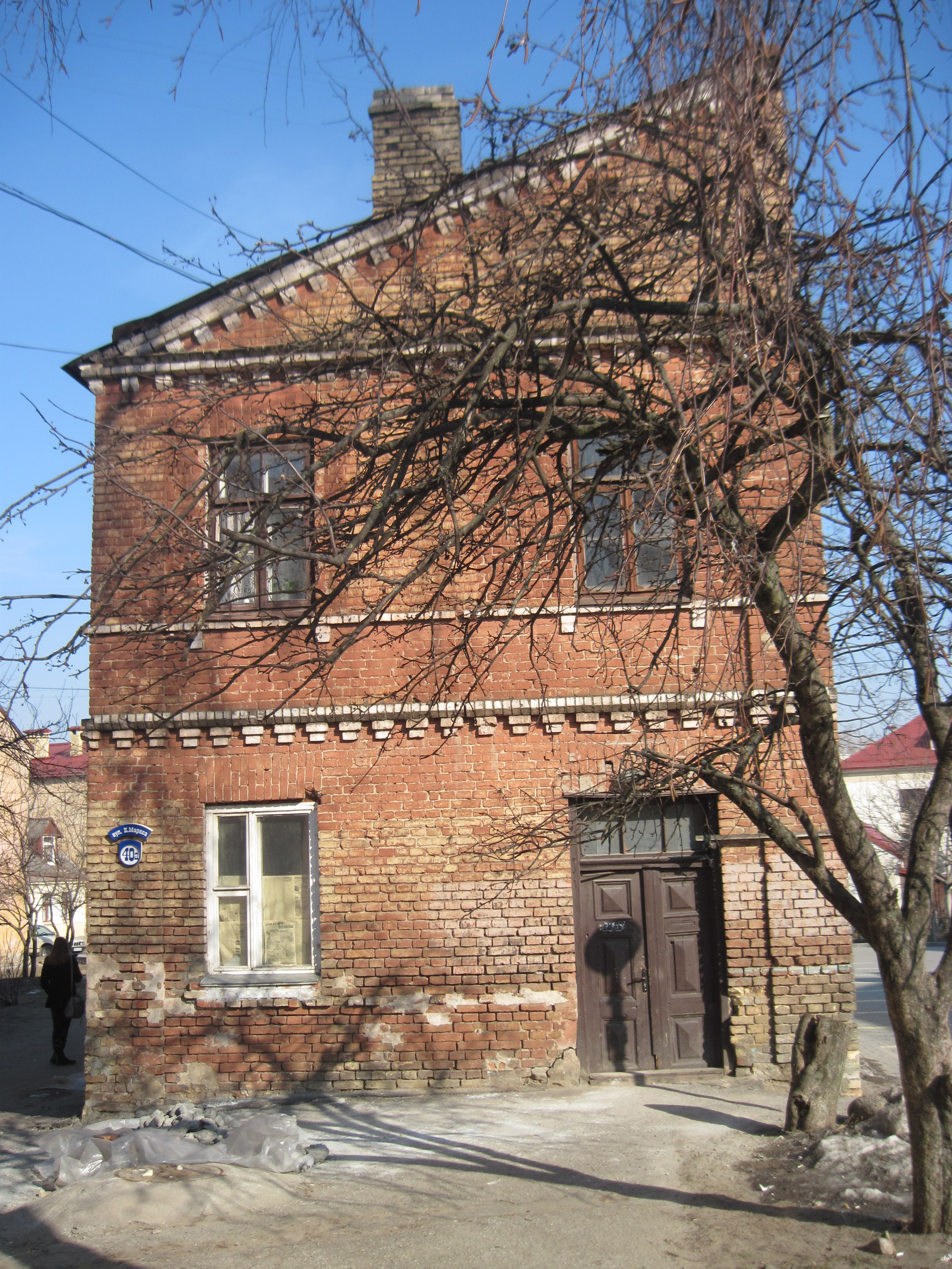 Забудова гістарычнага цэнтра Гродна, вуліца К. Маркса, 40А